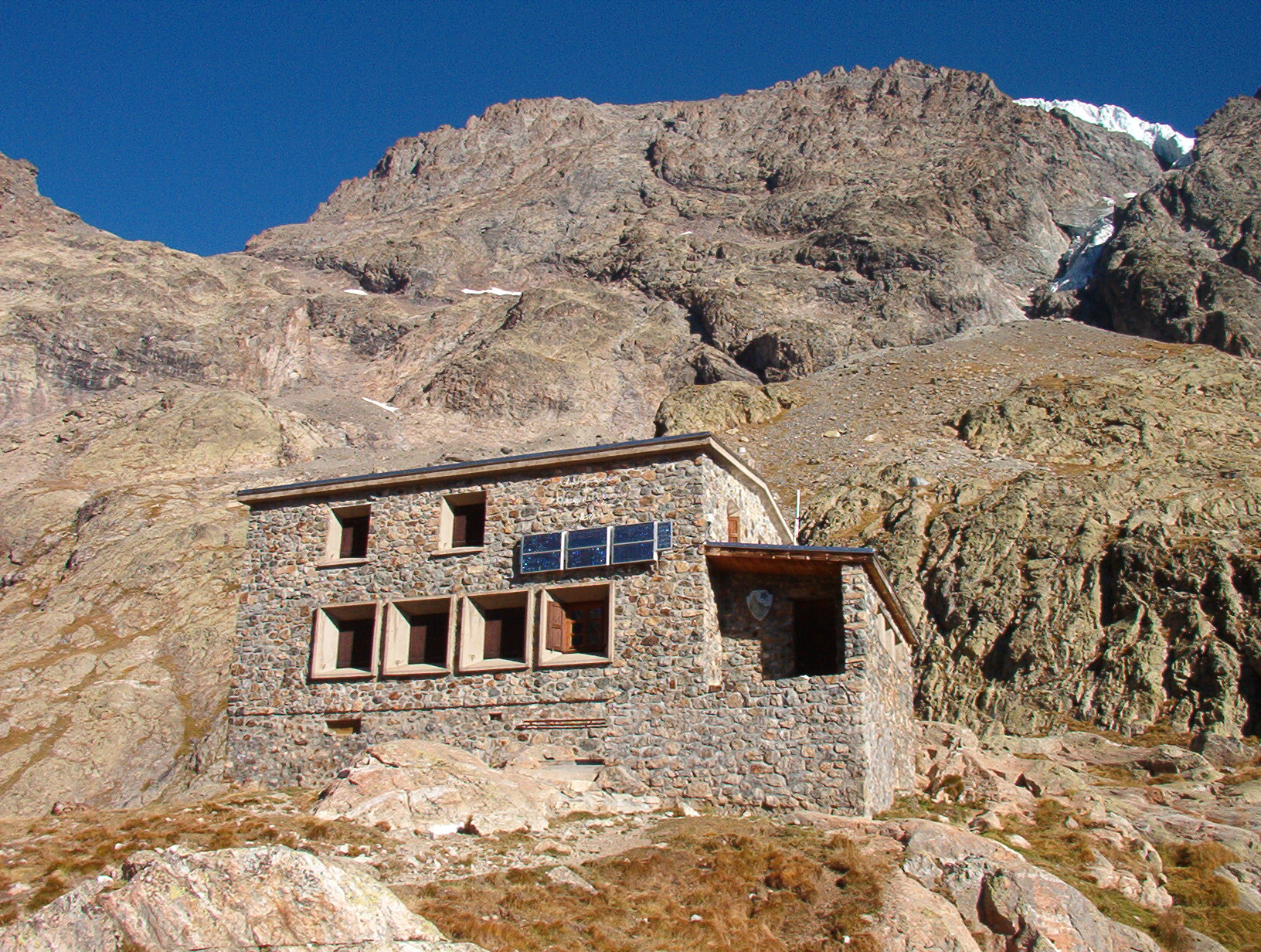 rifugio del Pelvoux - massiccio des Ecrins - France